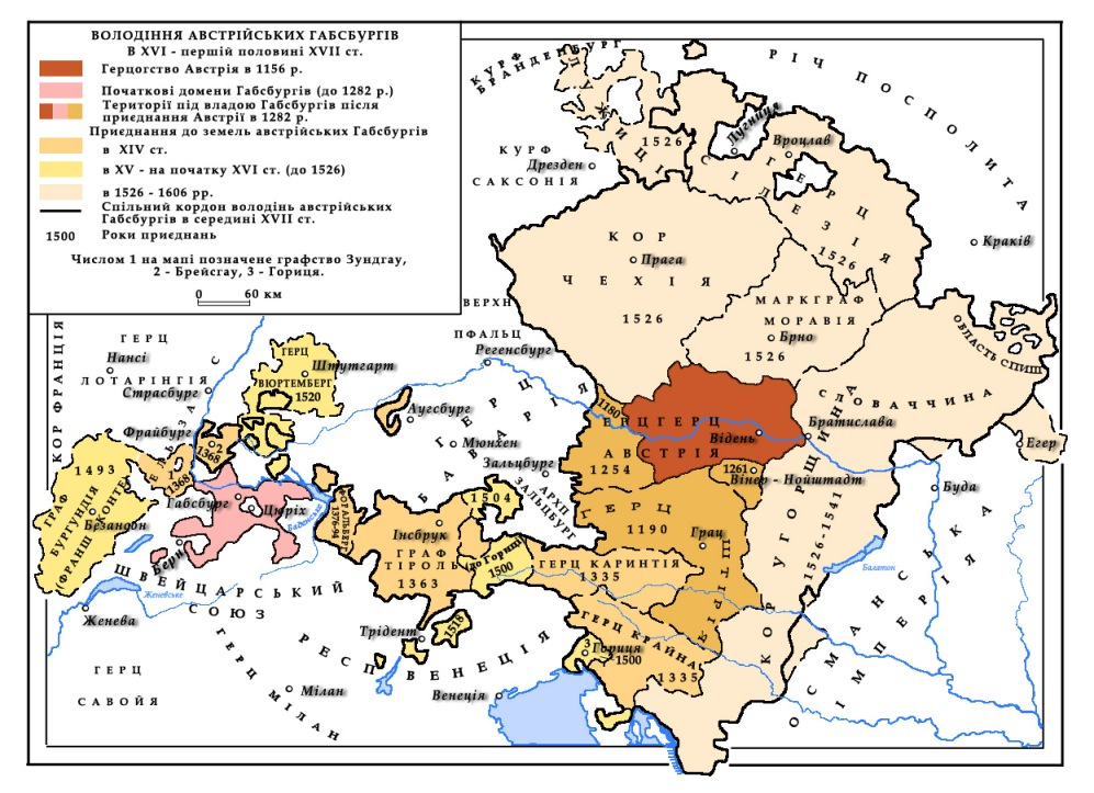 Історична мапа. Мапа володінь дому Габсбургів до 1648